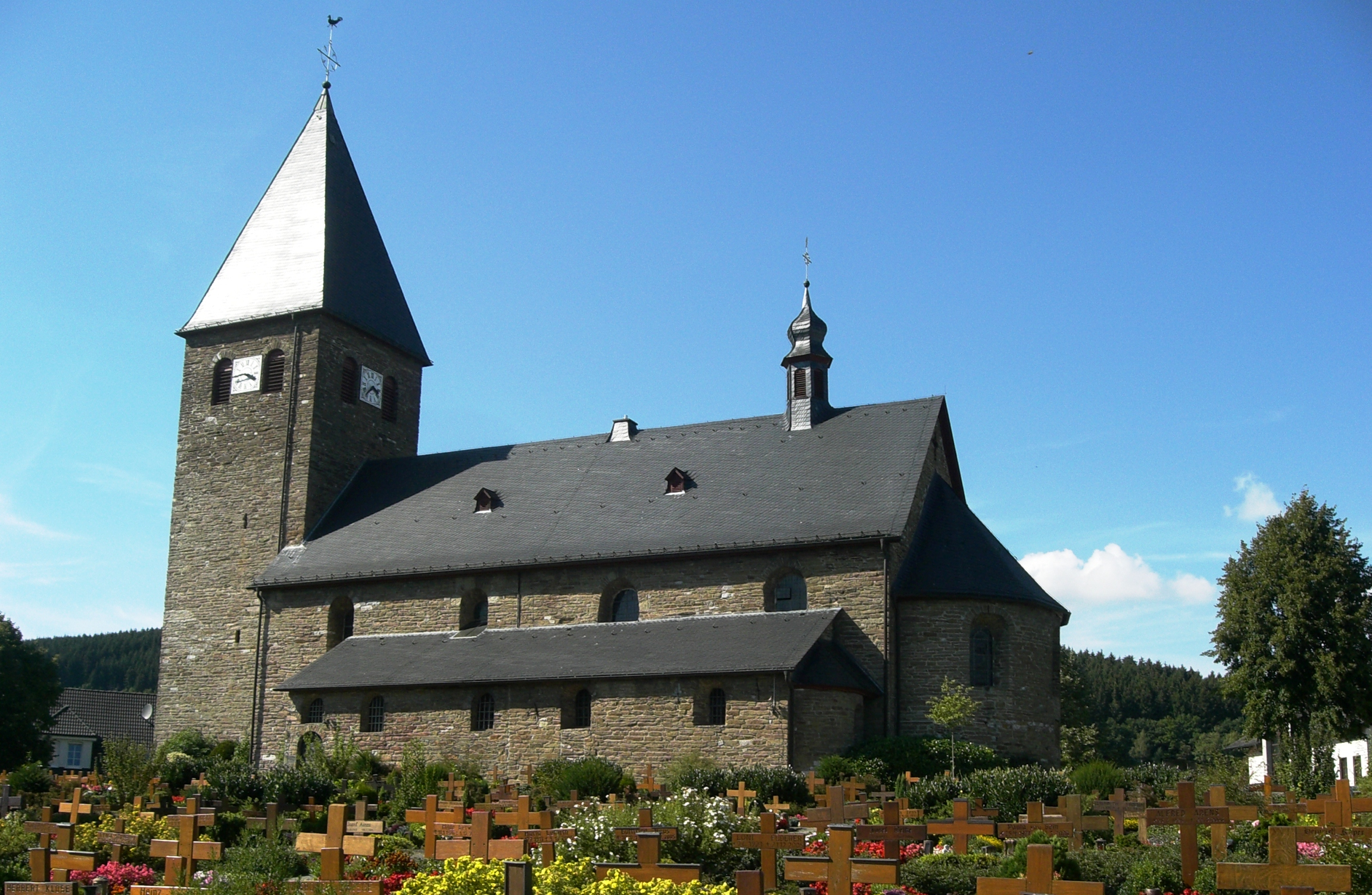 St. Hippolitus(2) in Attendorn-Helden